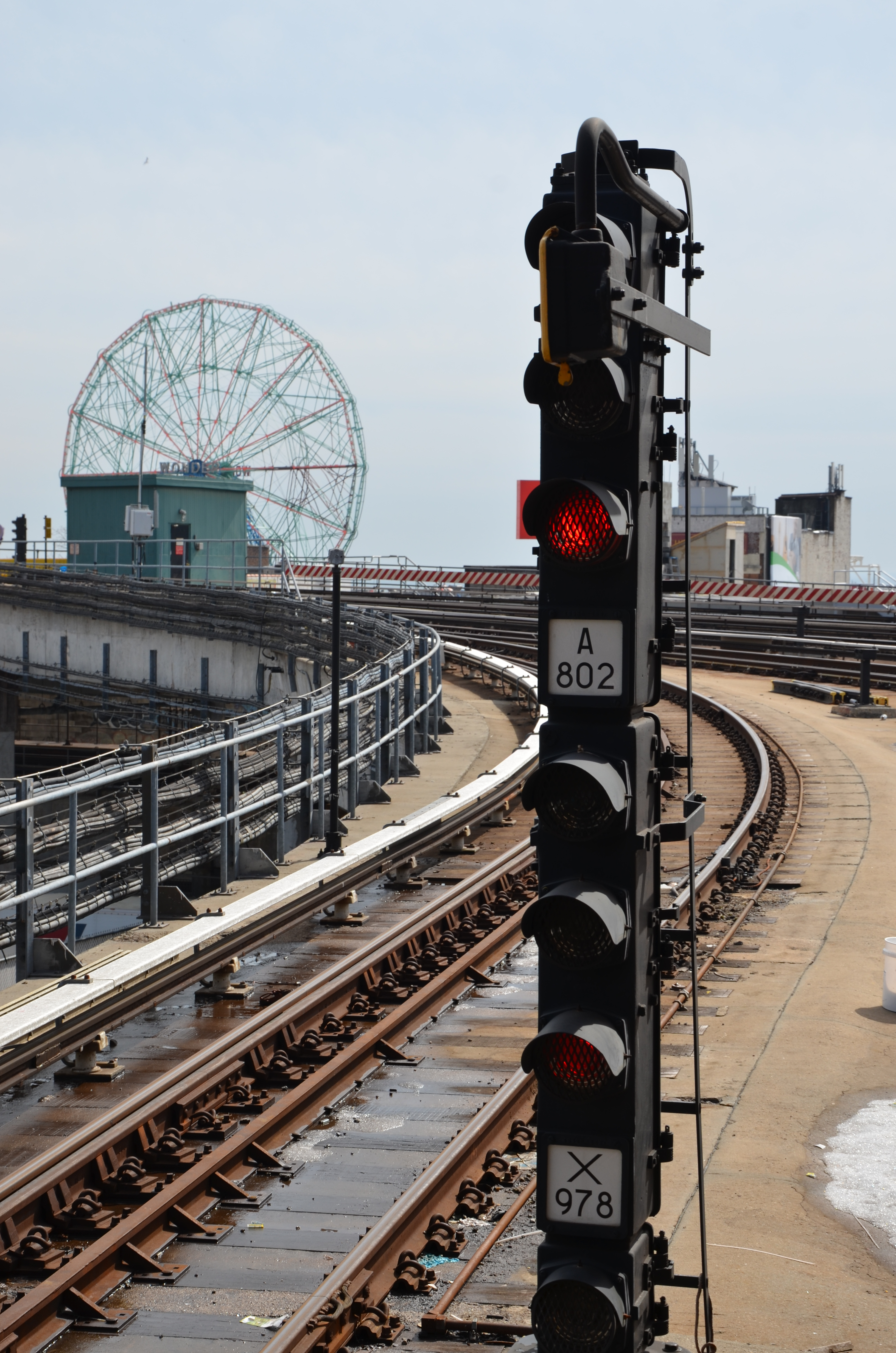 Metrostation Coney Island Stilwell Avenue.